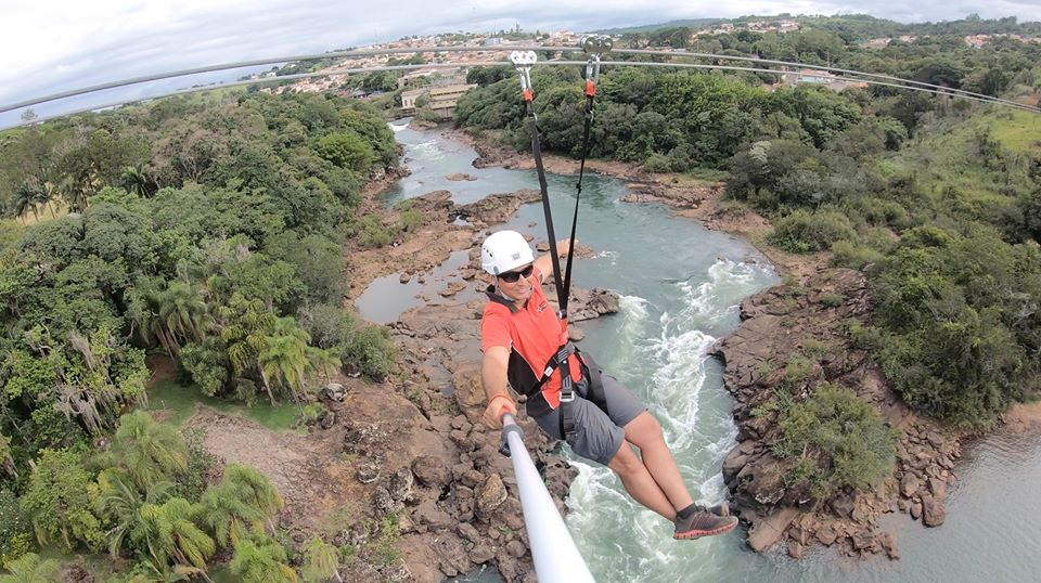 tirolina, localiza en Brazil